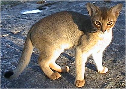 "Foto på en abessinier